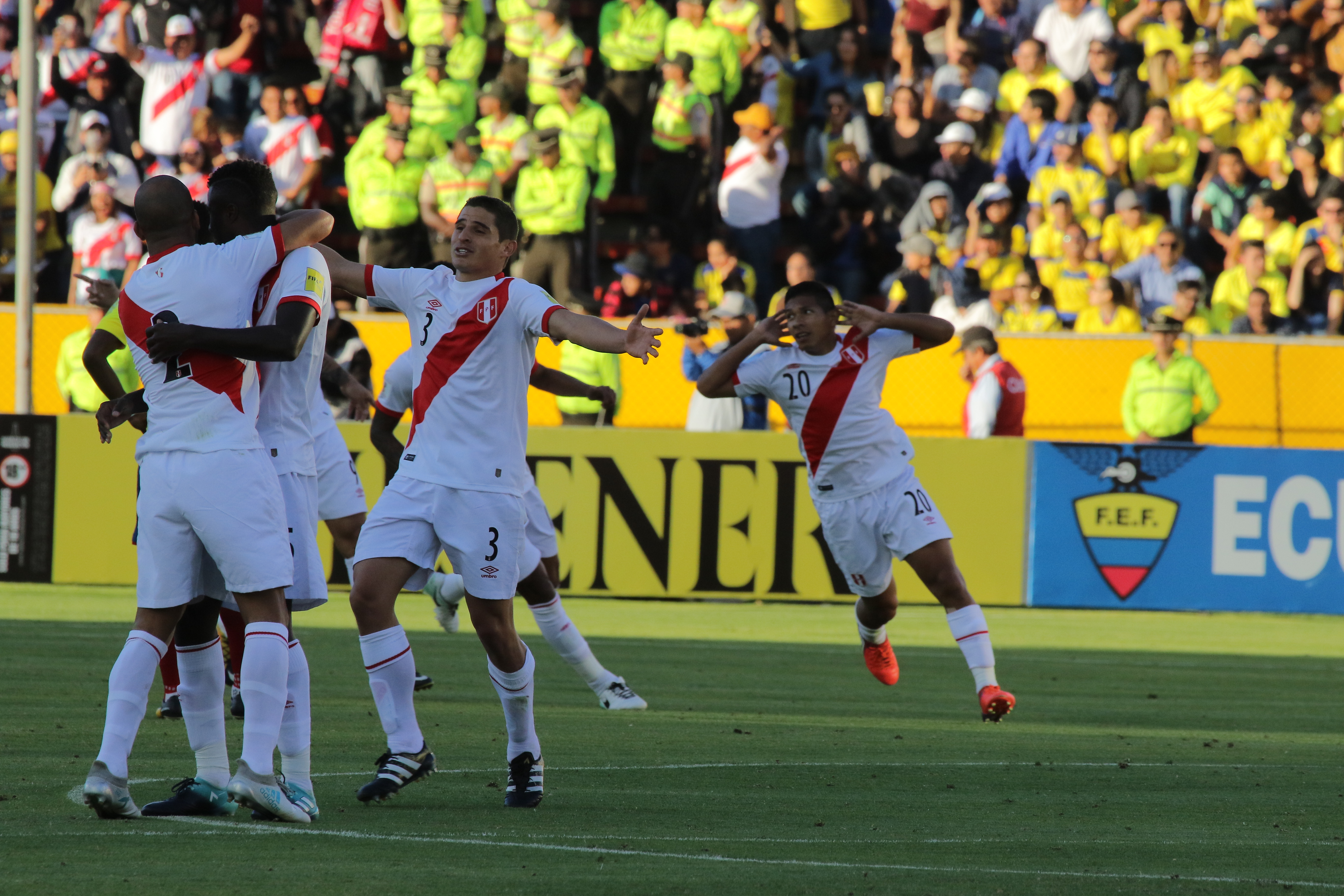 Quito 5 Sep (Andes).- Encuentro por eliminatorias Rusia 2018 entre Ecuador y Perú. Fotografías: Carlos Rodríguez/Andes.